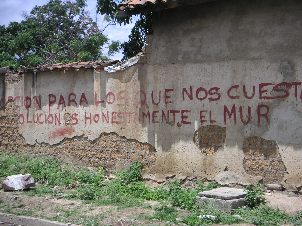 Movimiento de Unidad Revolucionaria mural in Ocotal, Nicaragua. Photo: Soman